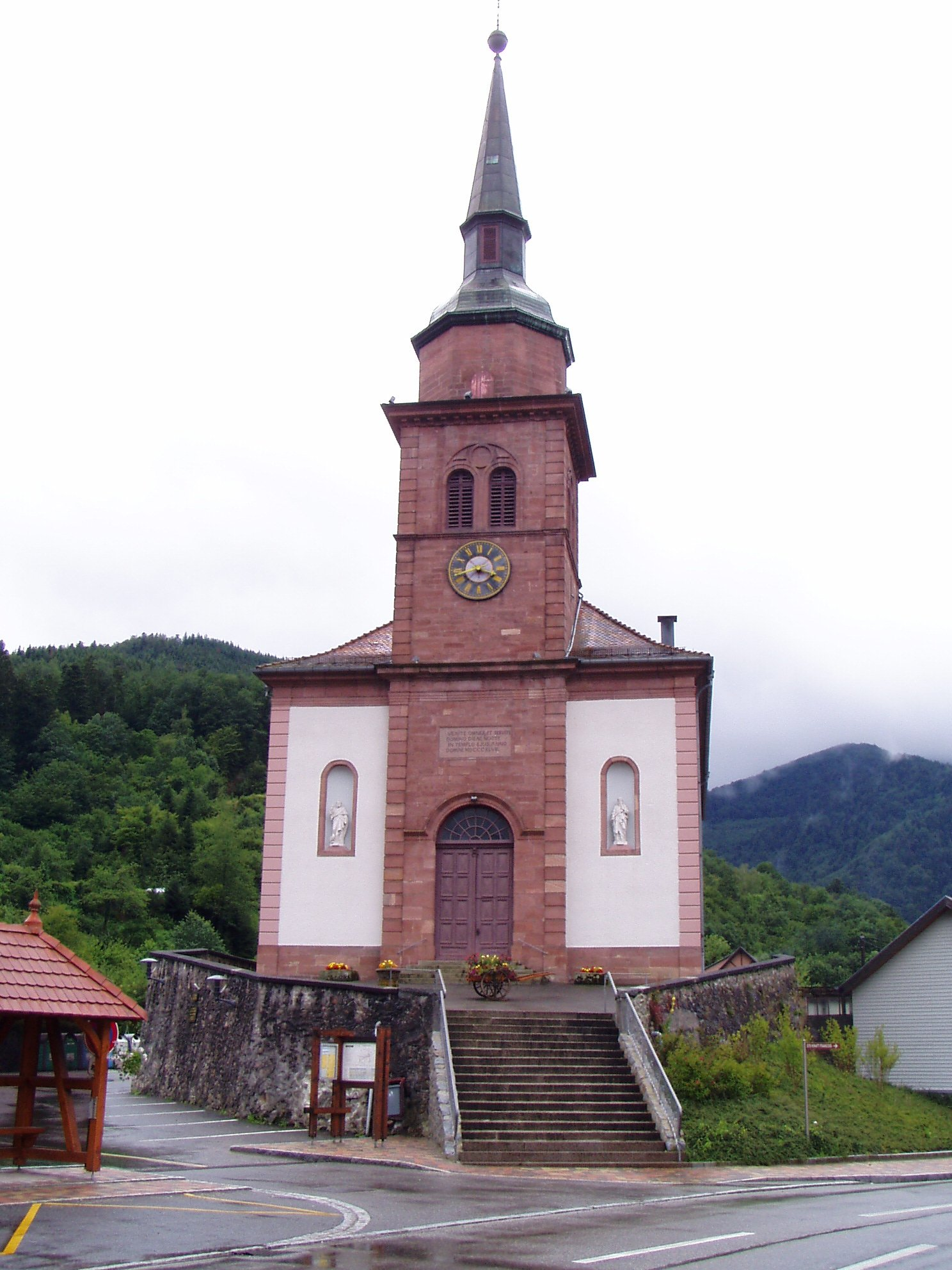 L'église d'Urbès, construite en 1847